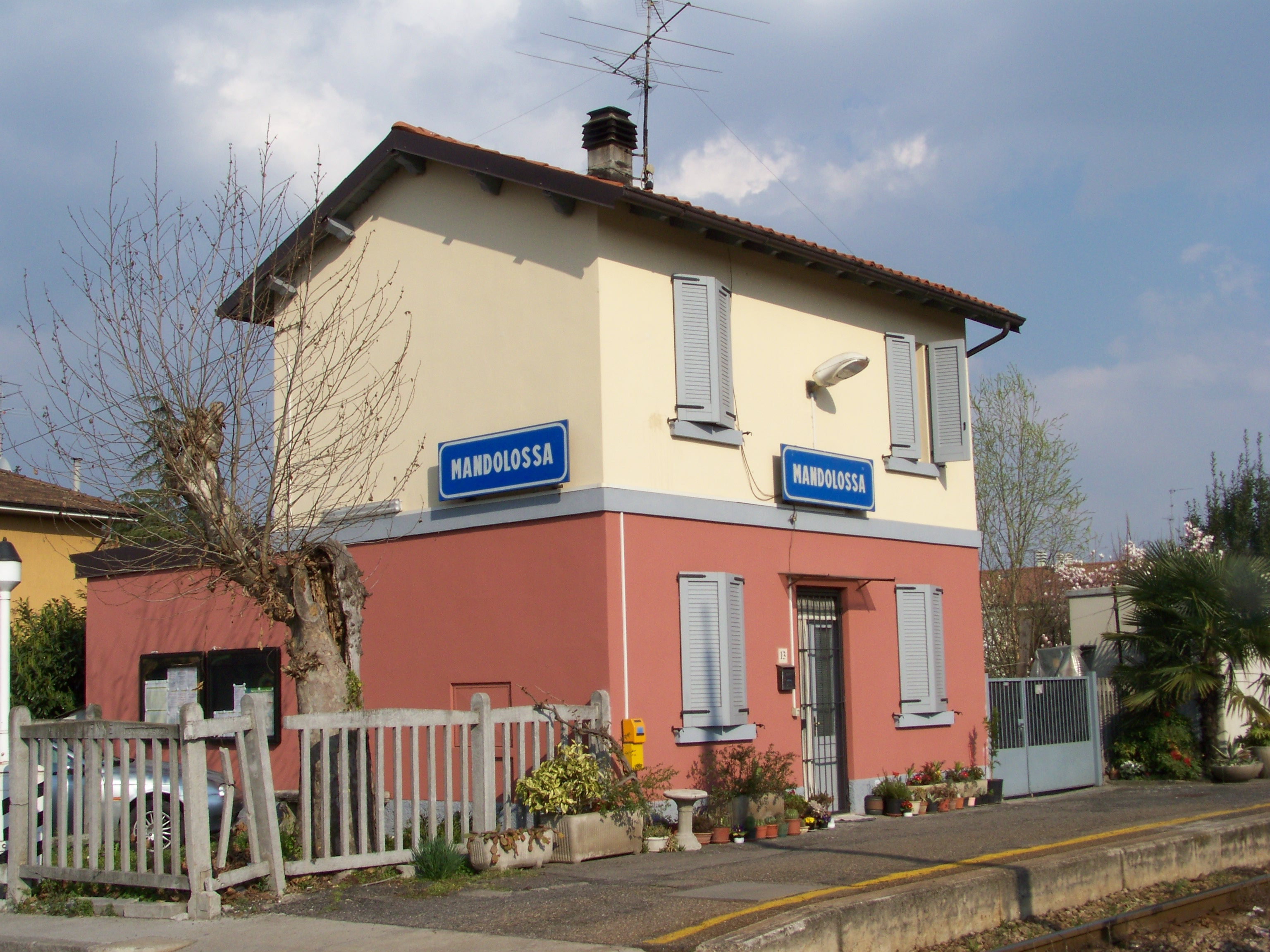 Lato binari della stazione di Mandolossa a Brescia sulla Brescia-Iseo-Edolo